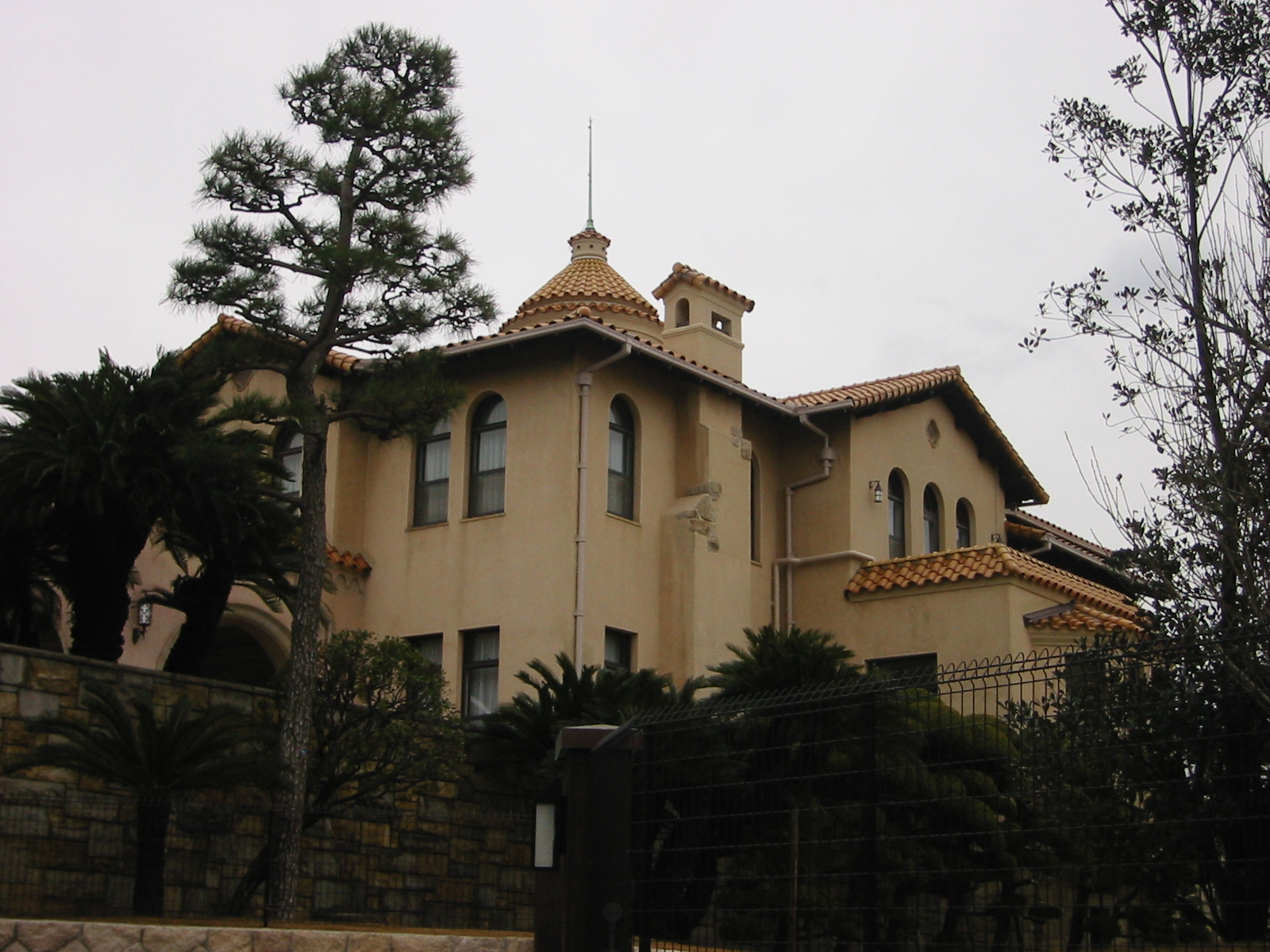 三洋電機(井植歳男)迎賓館（望淡閣） / 旧ジェームス邸1934年 設計-早良俊夫（竹中工務店）鉄筋コンクリート造2階